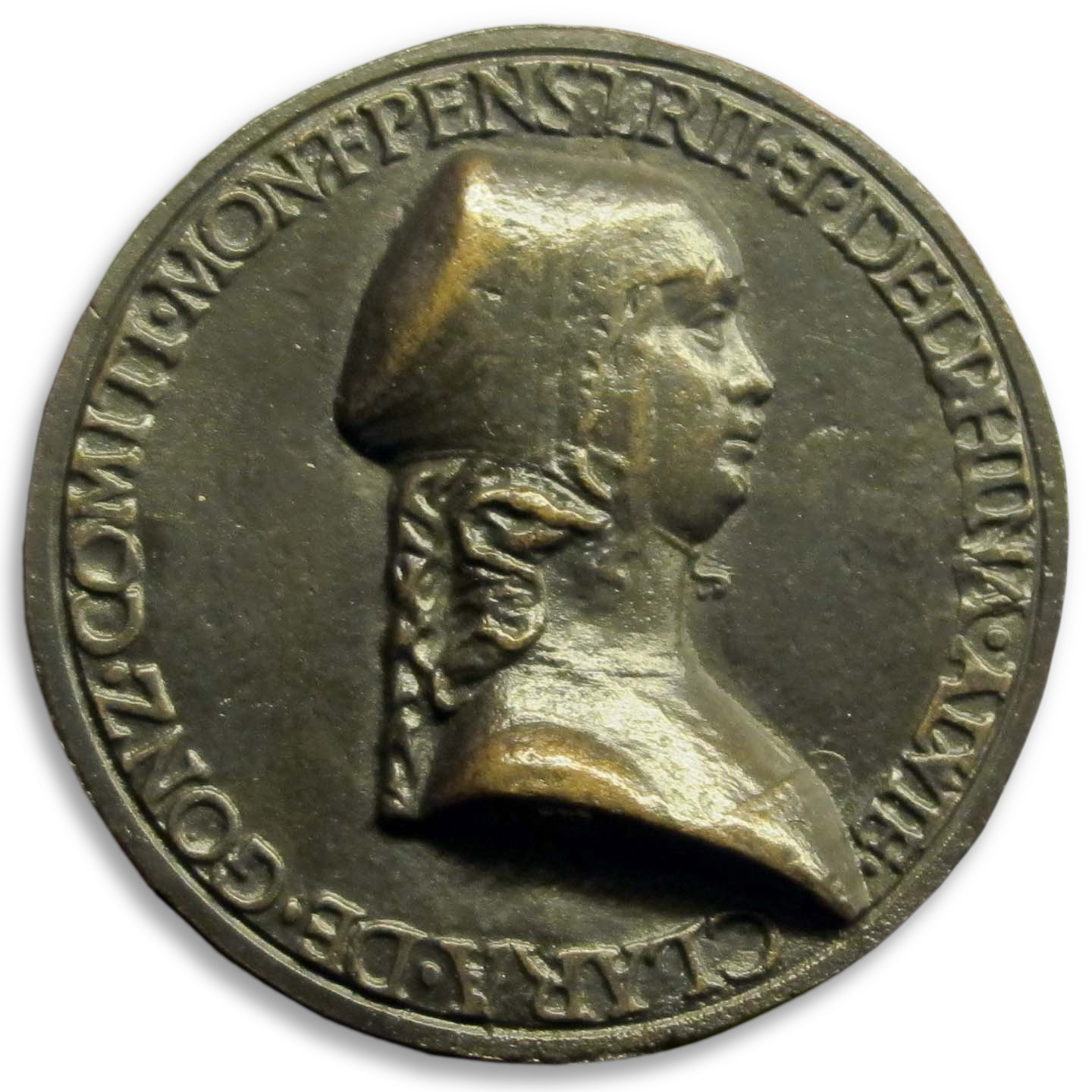 Medaglia di Chiara Gonzaga (1464-1503), recto